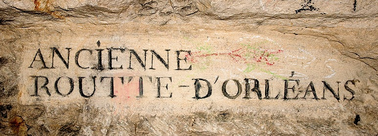 Plaque de rue de l'ancienne route d'Orléans (actuelle rue de la Tombe-Issoire) dans les carrières souterraines de Paris.